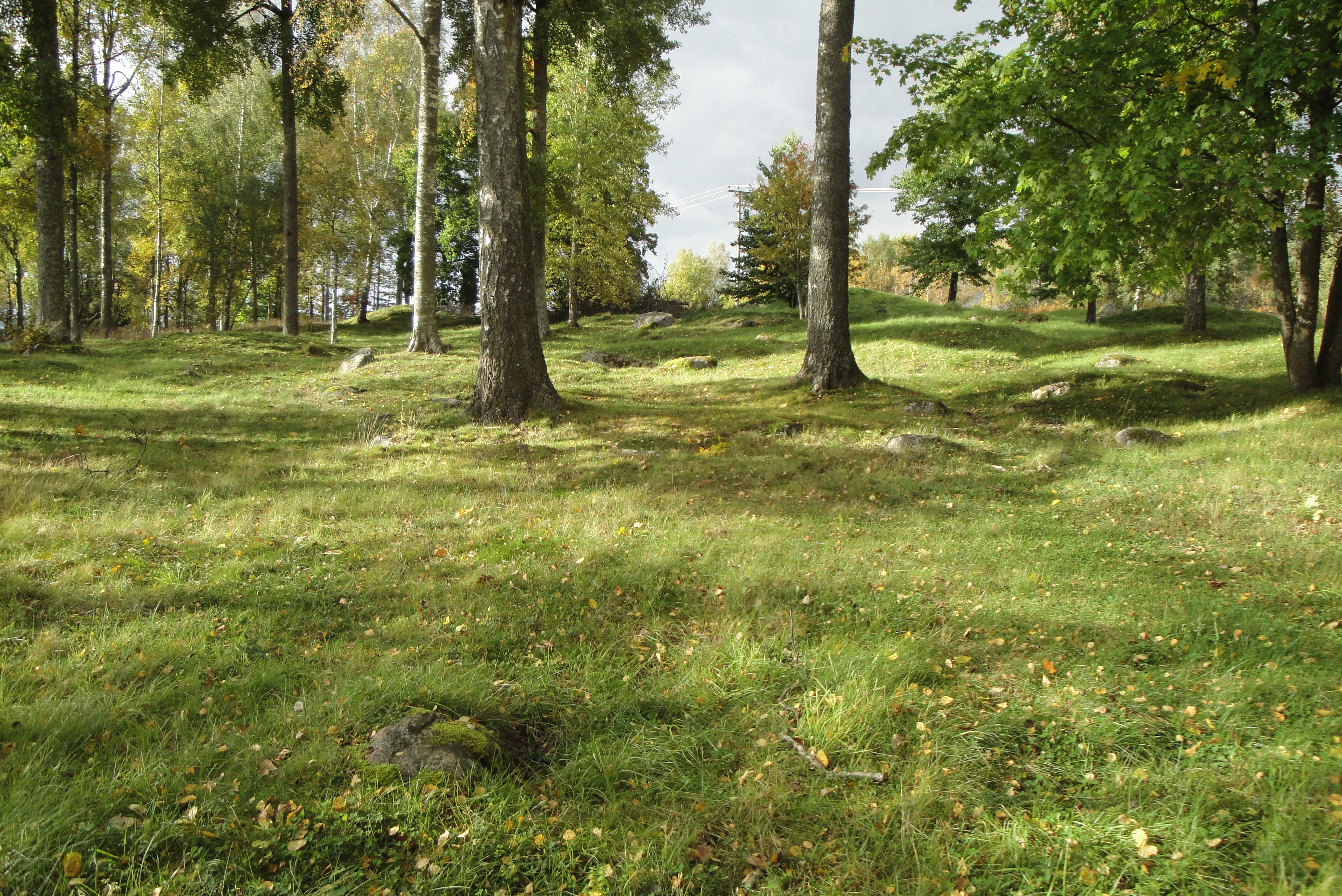 Gåskullabacken (Tuna 27:1)